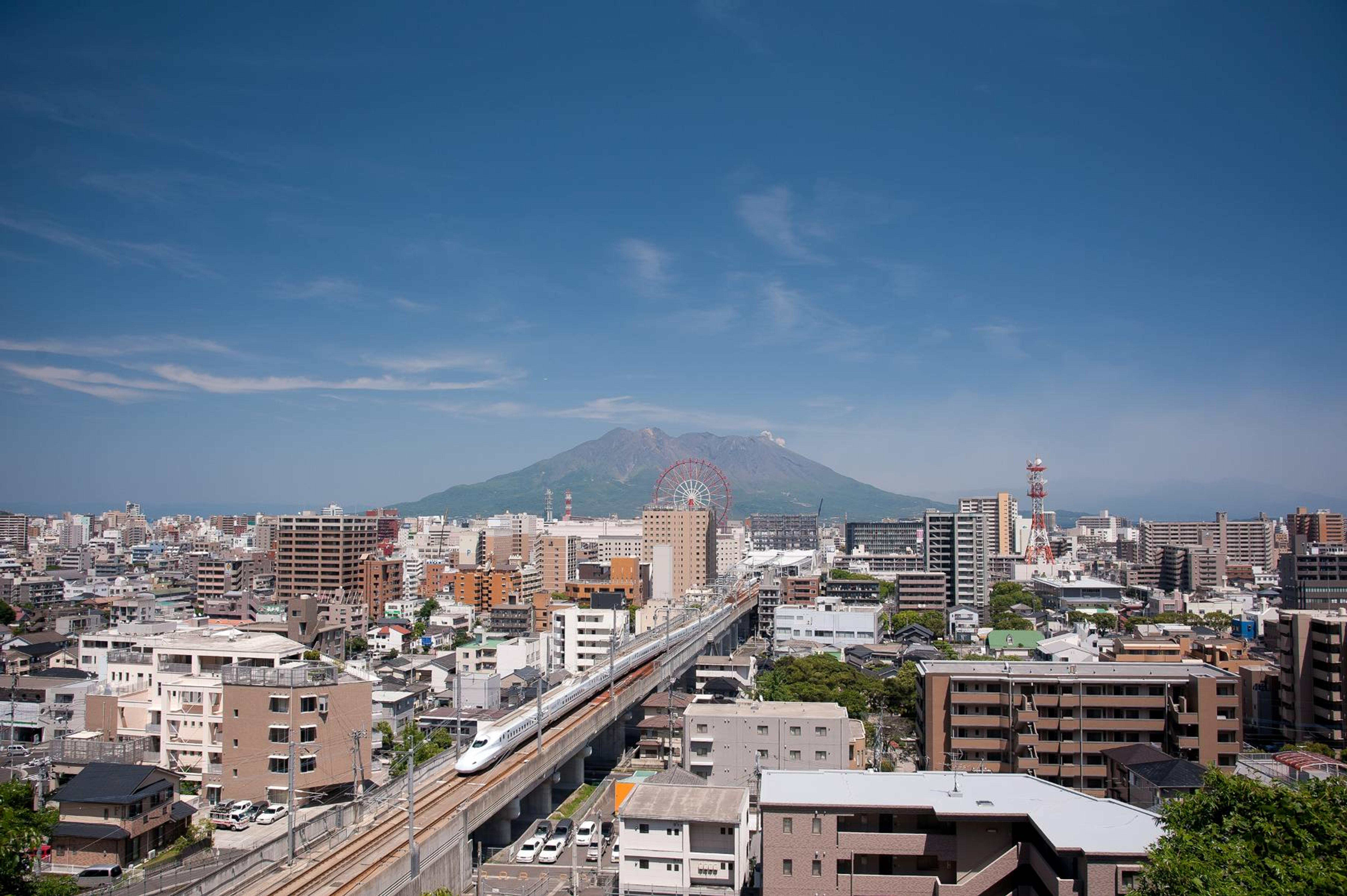 鹿児島中央駅に到着する新幹線N700系